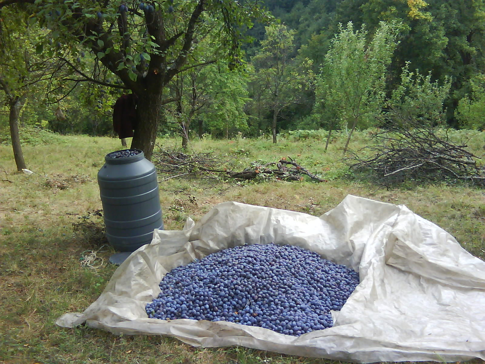 Autor:Nenad Marković